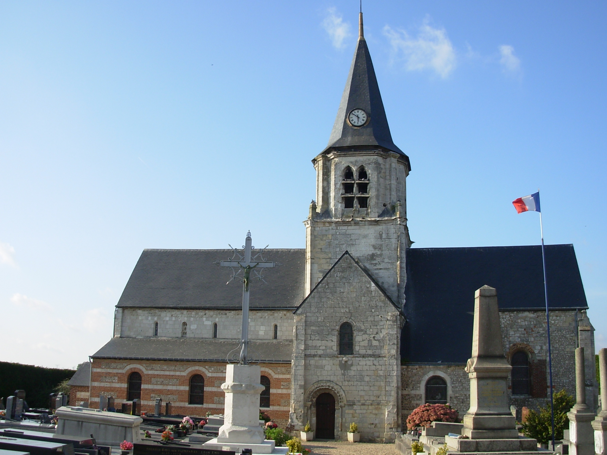 Eglise Saint Maclou, Sainneville sur Seine